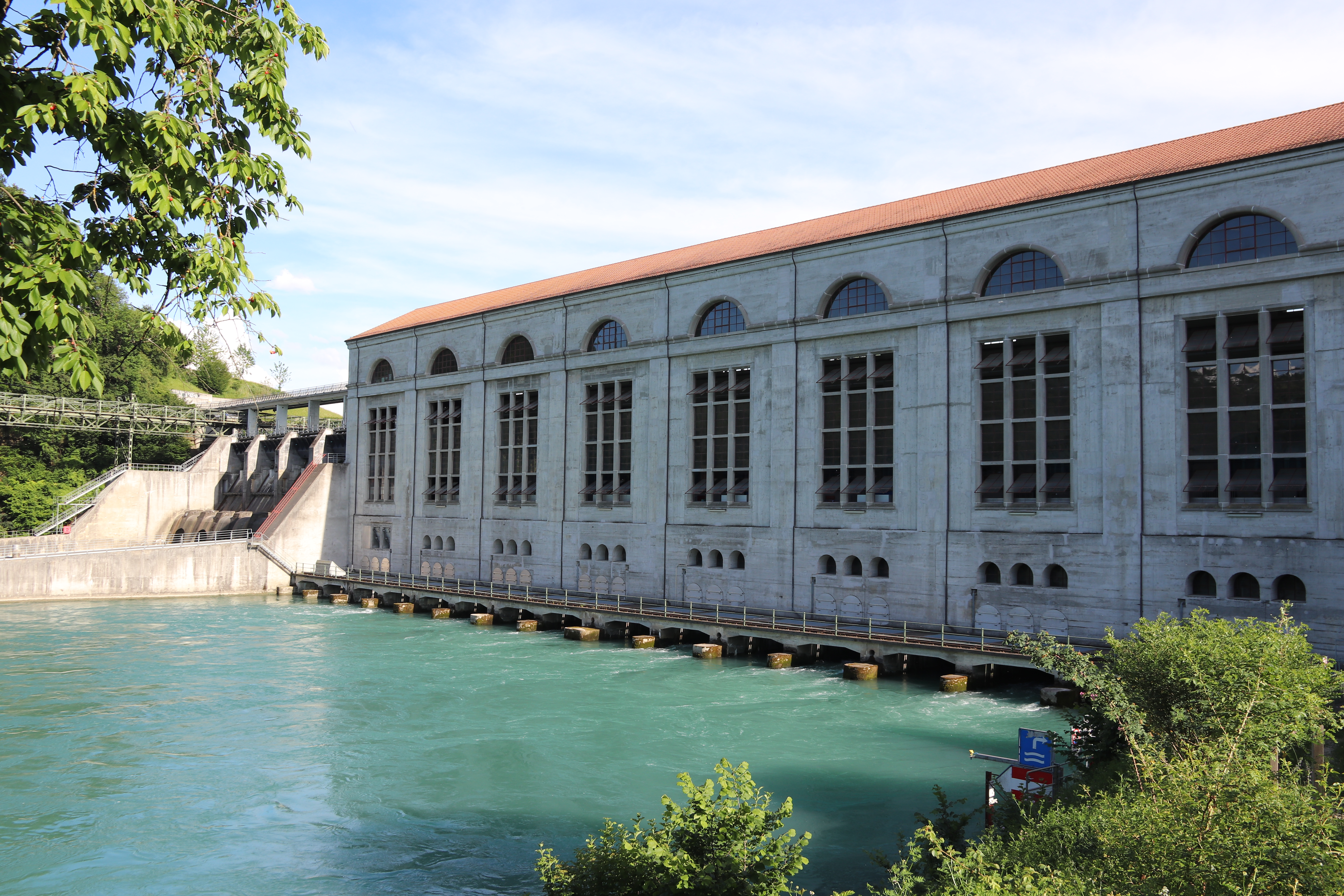 Ausfluss des Kraftwerkes Mühleberg.